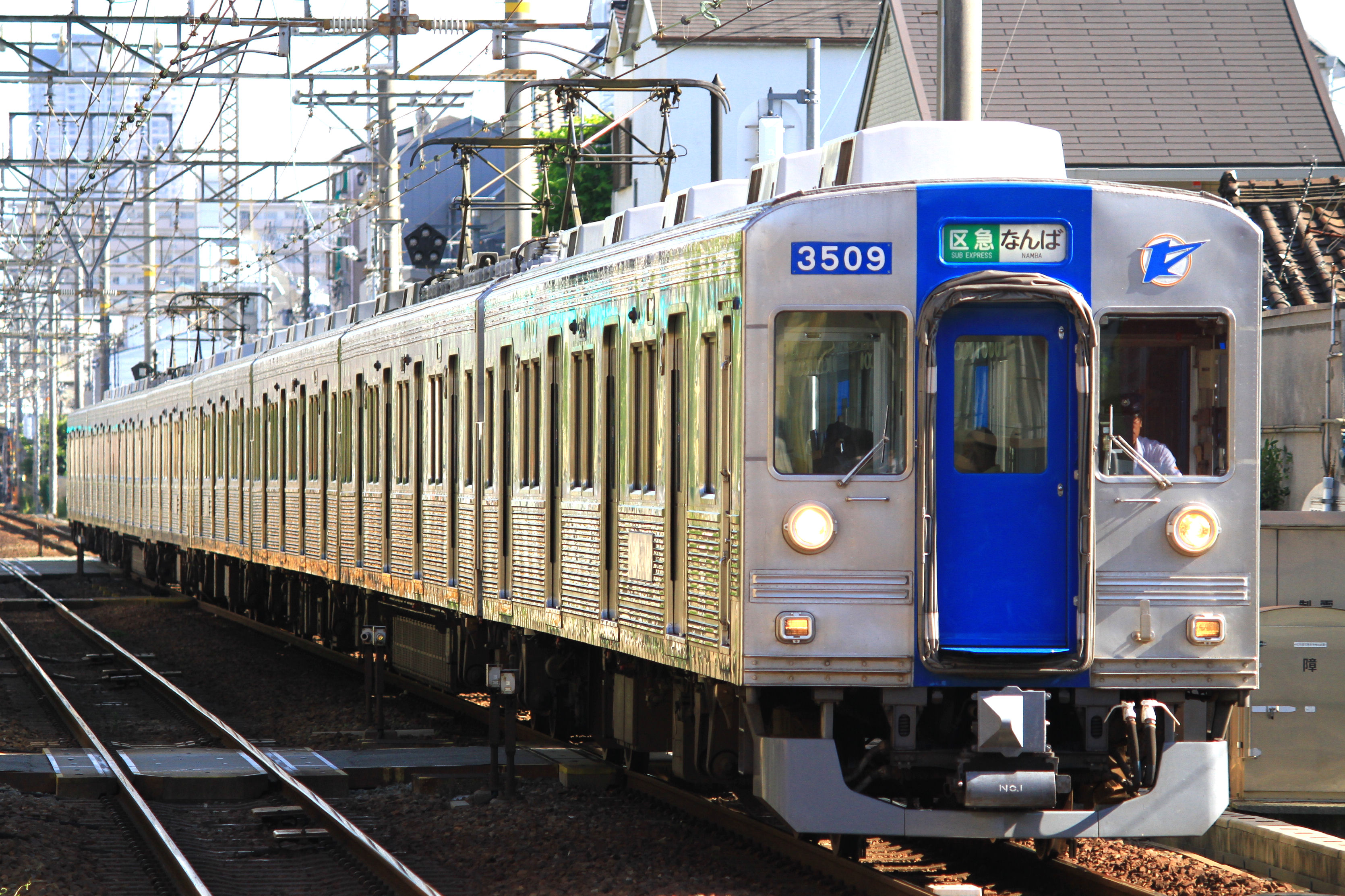 泉北高速鉄道（旧：大阪府都市開発）3000系 3509F（沢ノ町駅にて） Canon EOS 7D